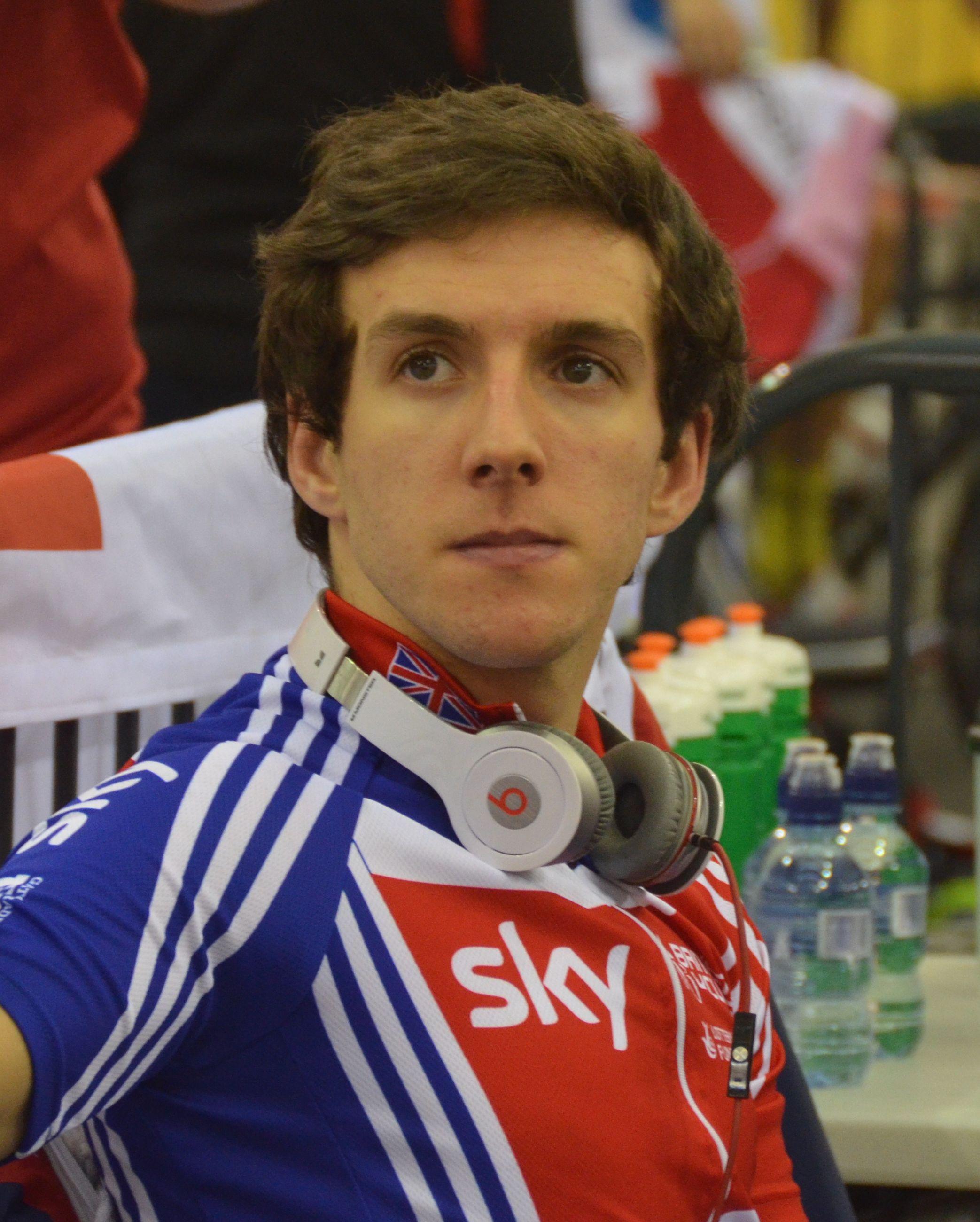 Simon Yates, britischer Radsportler